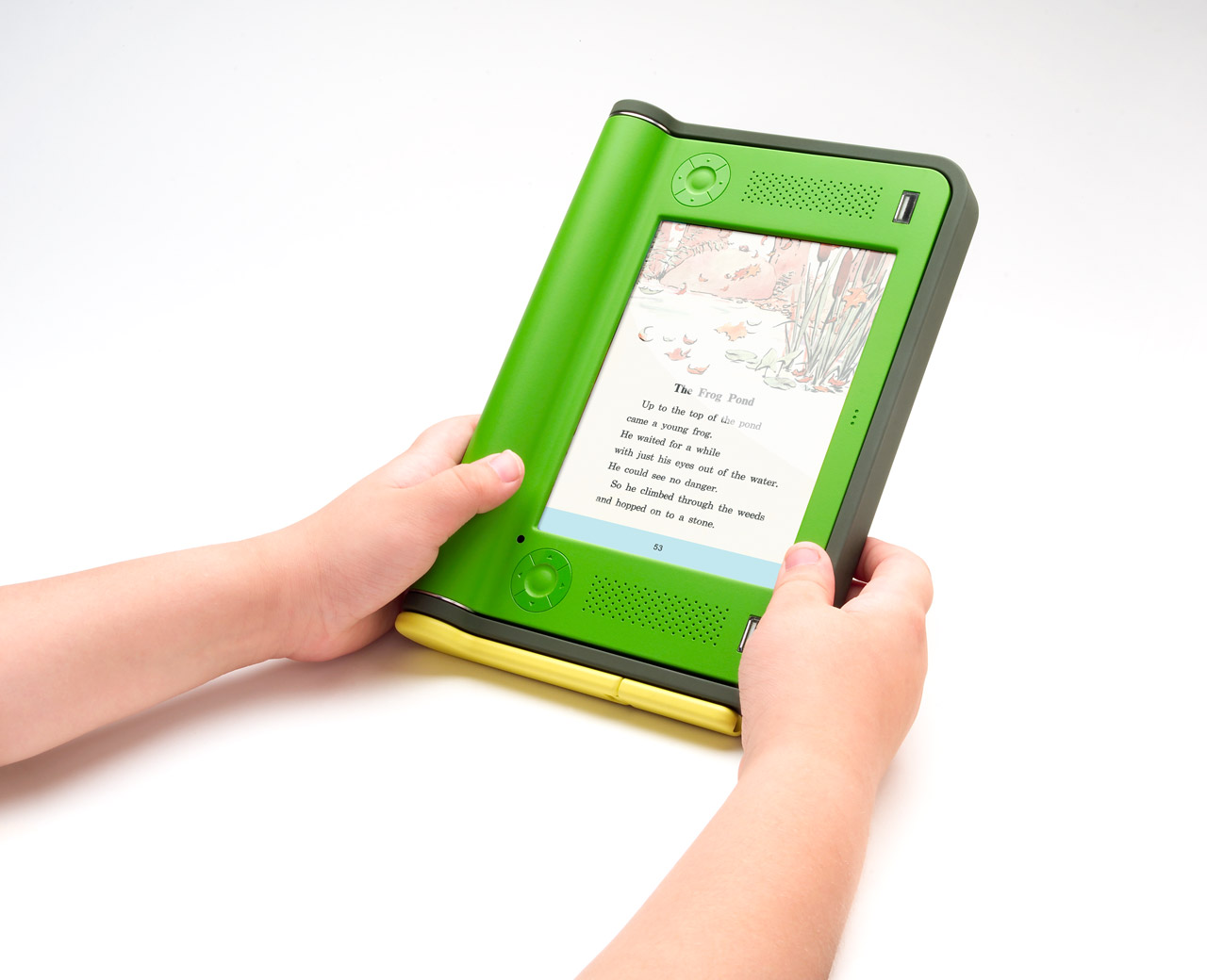 $100 Laptop prototype